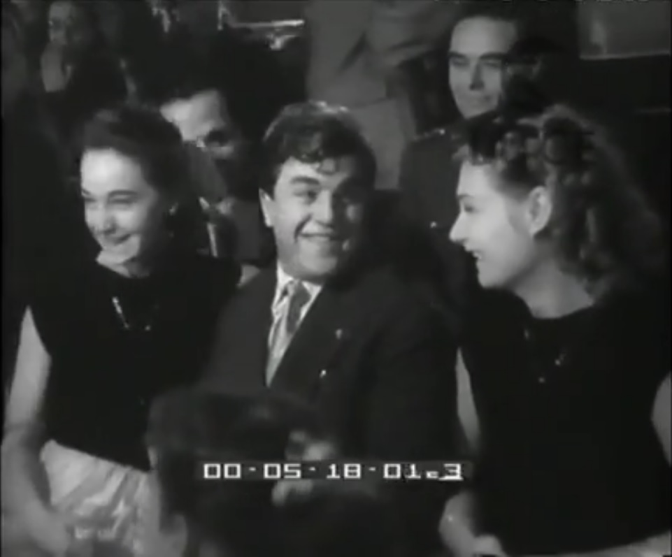 fotogramma del filmato LA SETTIMANA INCOM / 00556 Una "prima" cinematografica d'eccezione pubblicato da Istituto LUCE data: 16/02/1951 durata: 00:02:15 colore: b/n sonoro: sonoro codice filmato: I055604